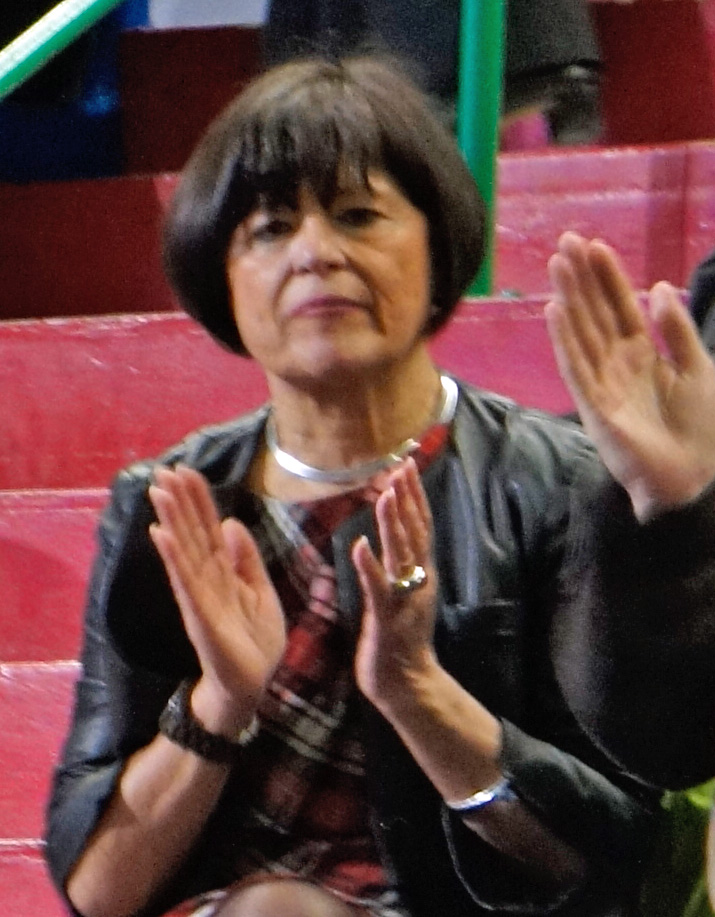 Catherine Génisson femme politique française et sénatrice.